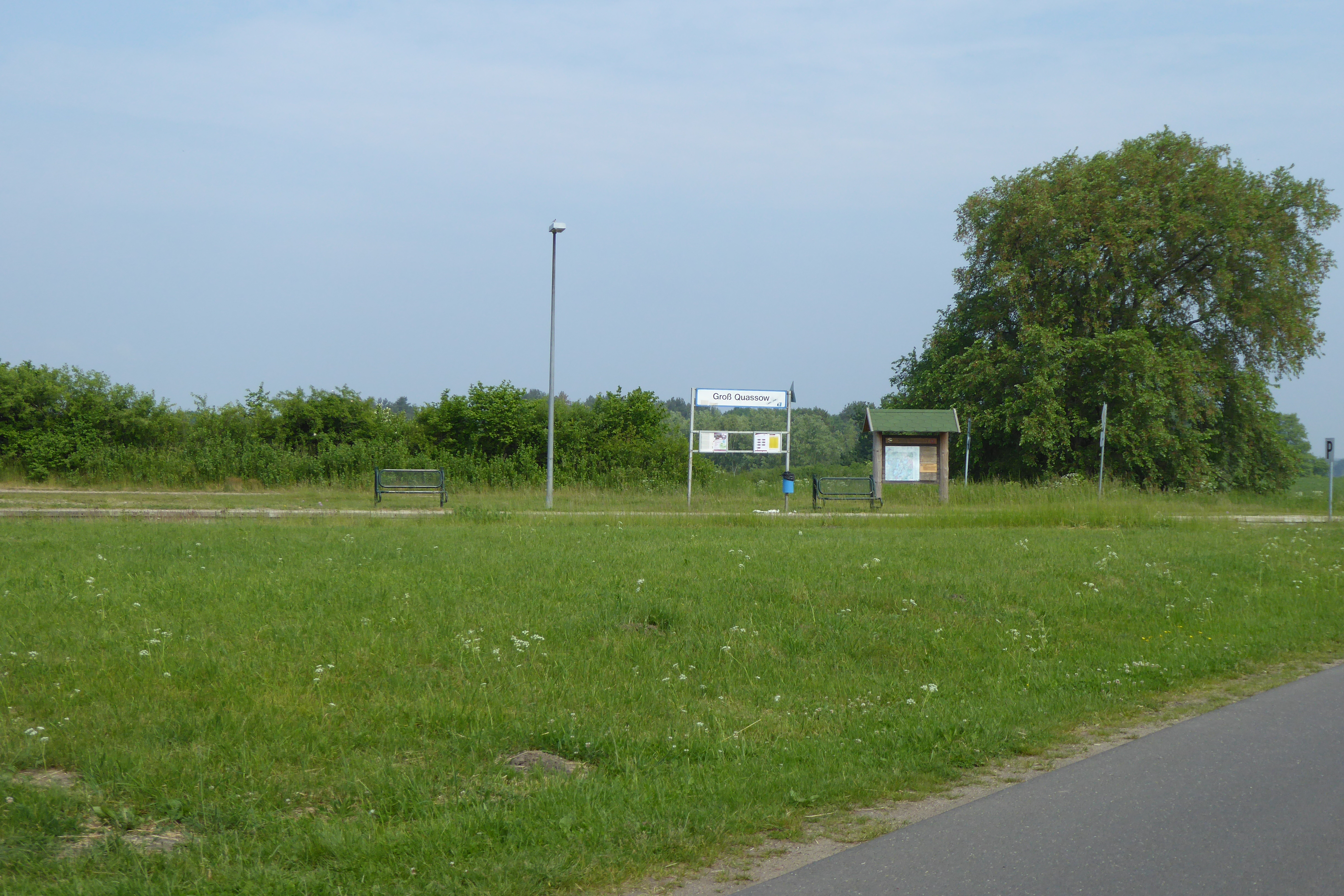 Bahnhof/Haltepunkt in Groß Quassow